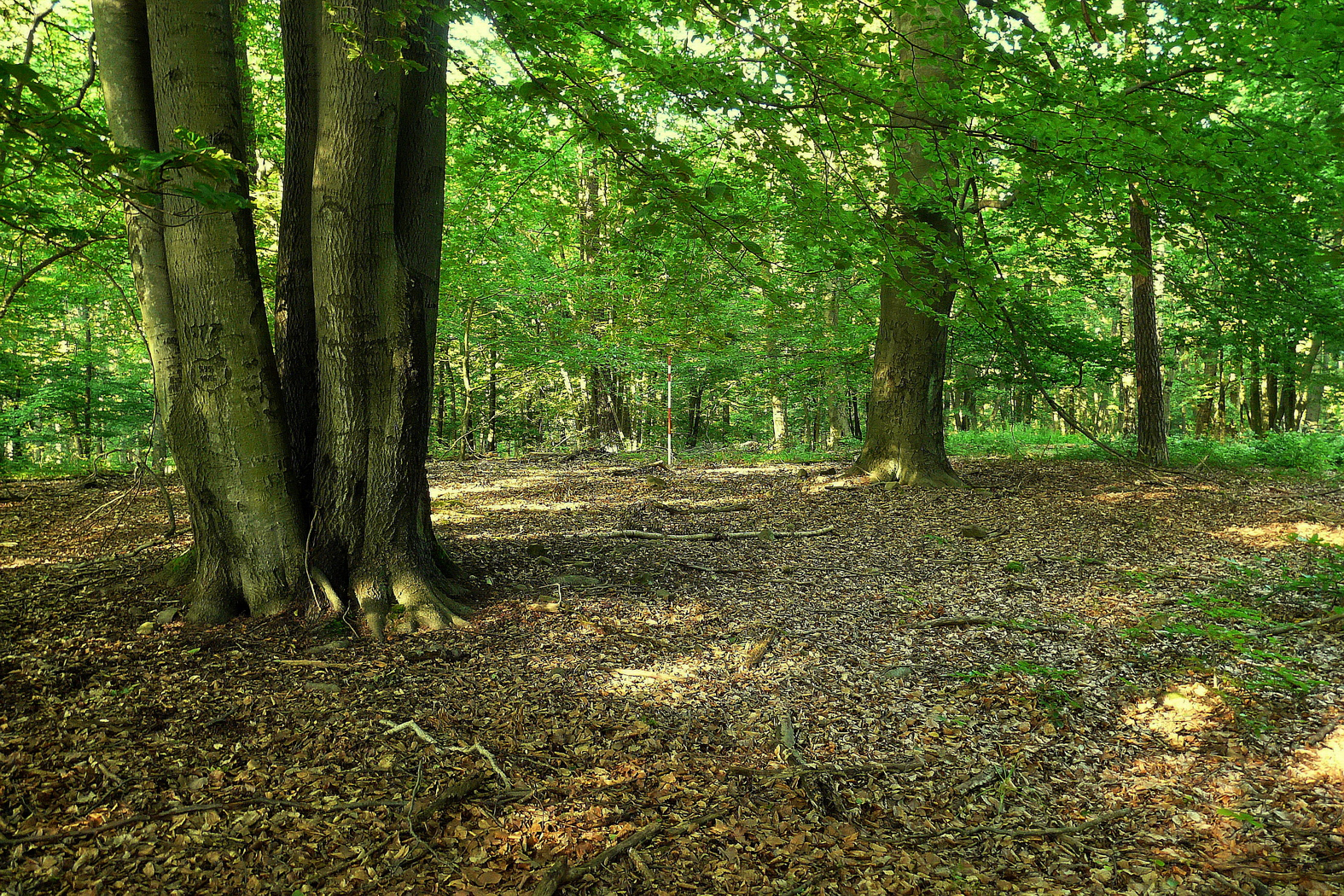 Vrchol Rokytské horky